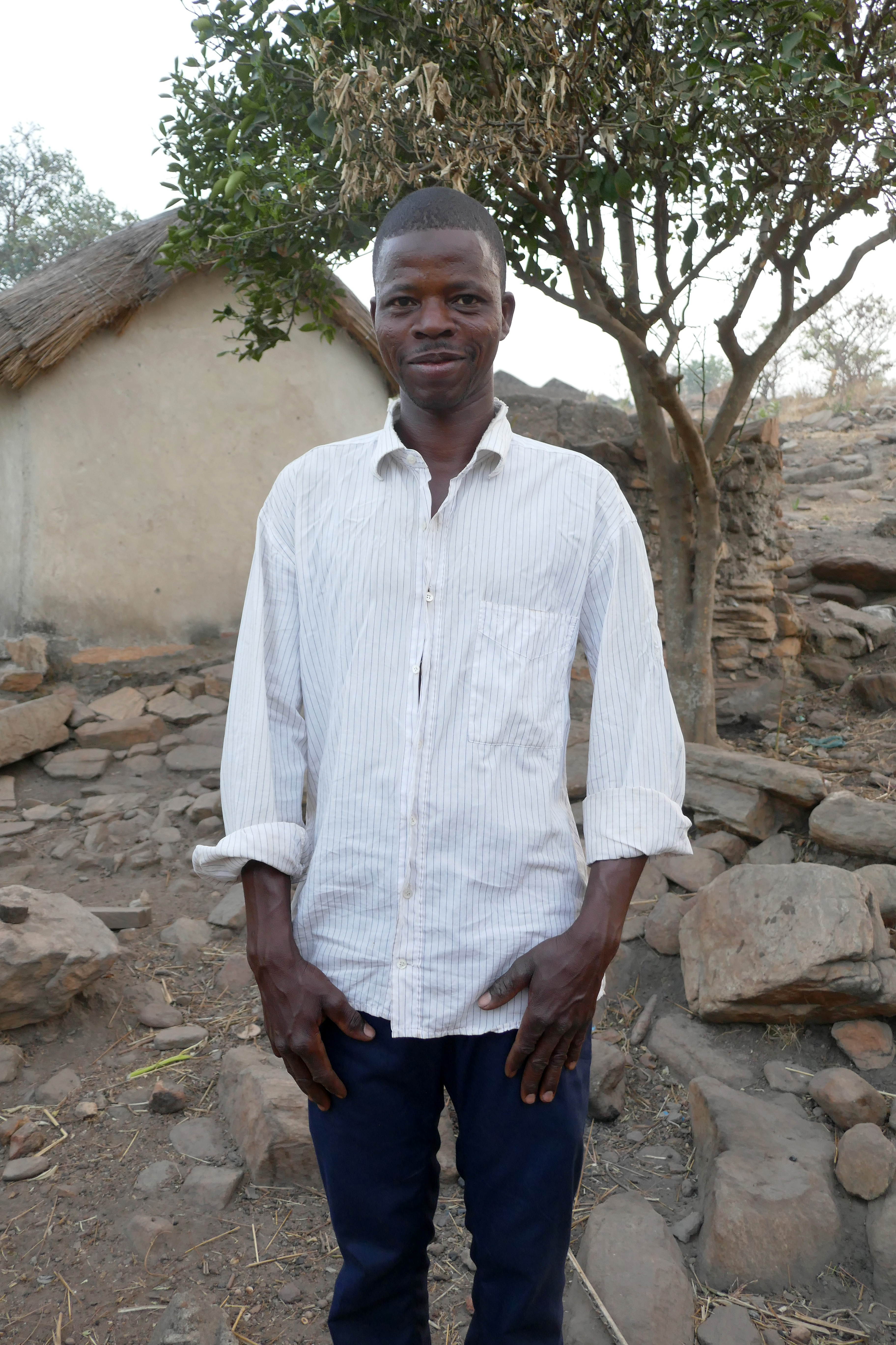 Jeune habitant de Tanéka-Béri (Bénin).